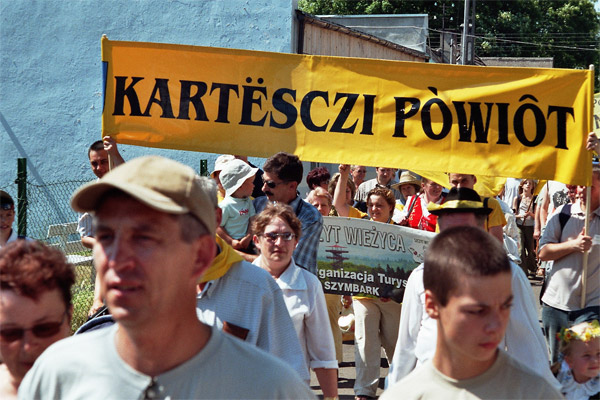 Zjazd Kaszubów, Łeba 2005. Przemarsz Powiatu kartuskiego. Kaszëbsczi: Zéńdzenié Kaszëbów w Lebie w 2005 r. Przemôrsz Kartësczégò krézu.